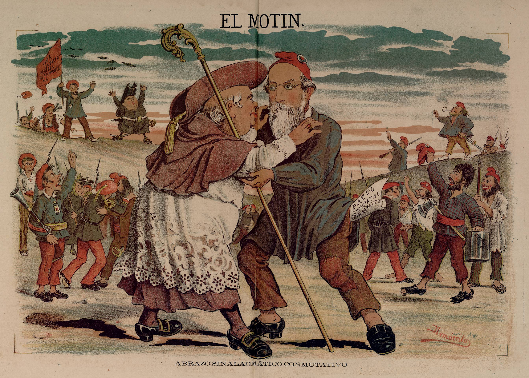 Abrazo sinalagmático conmutativo, de Eduardo Sojo «Demócrito, publicada en la revista satírica española El Motín.